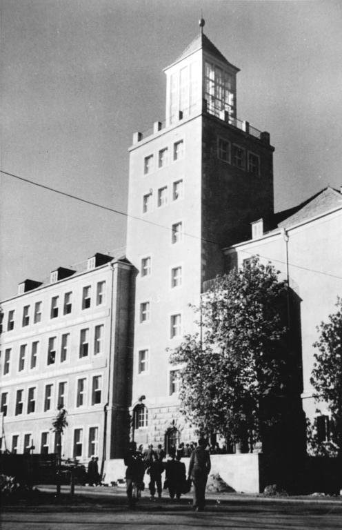 Dresden, Technische Hochschule, Arbeiter- und Bauernfakultät Zentralbild 4.6.1953 125 Jahre Technische Hochschule Dresden Vom 4- - 6.Juni 1953 begeht die Technische Hochschule Dresden, die einzige in der Deutschen Demokratischen Republik und die größte polytechnische Hochschule Deutschlands, ihr hundertfünfundzwanzigstes Bestehen. UBz: Arbeiter- und Bauernfakultät. Arbeiter- & Bauernfakultät mit Studenten Technische Hochschule Dresden Wiederaufbau: Arbeiter- und Bauernfakultät, heutiges BSZ Berufliche Schulzentrum für Elektrotechnik Dresden, Strehlener Platz 2